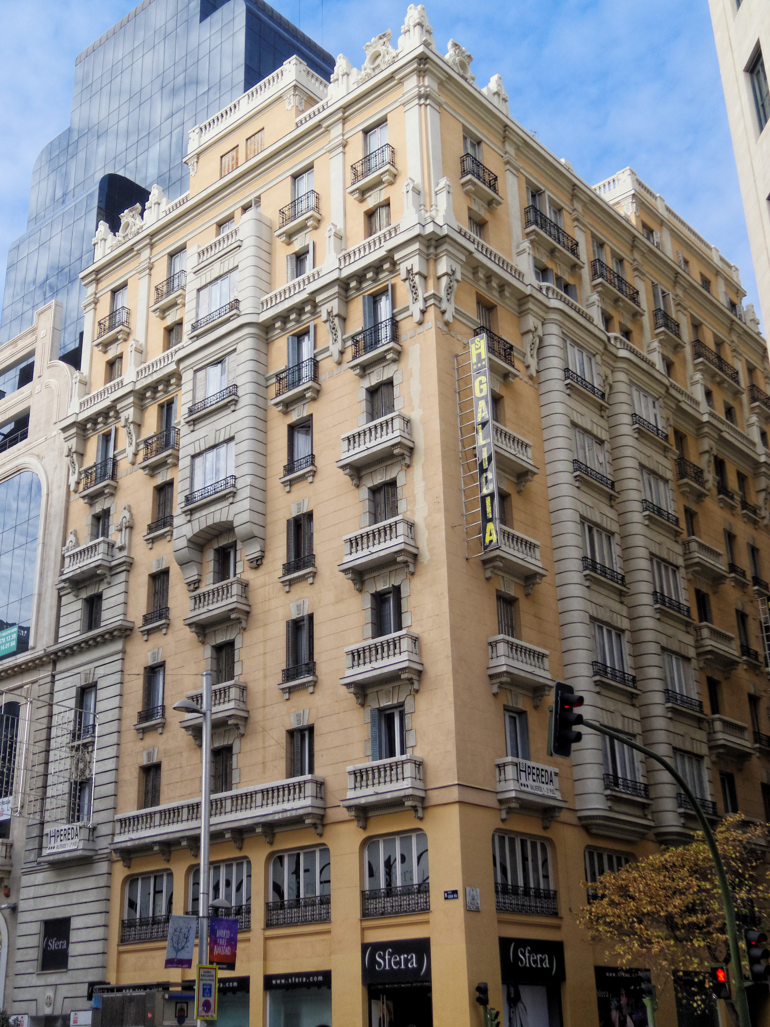 Edificio de la calle Gran Vía Nº 30, Madrid.Originalmente viviendas y Teatro Fontalba. Construido entre 1920 y 1924 por Teodoro de Anasagasti y José López Sallaberry.